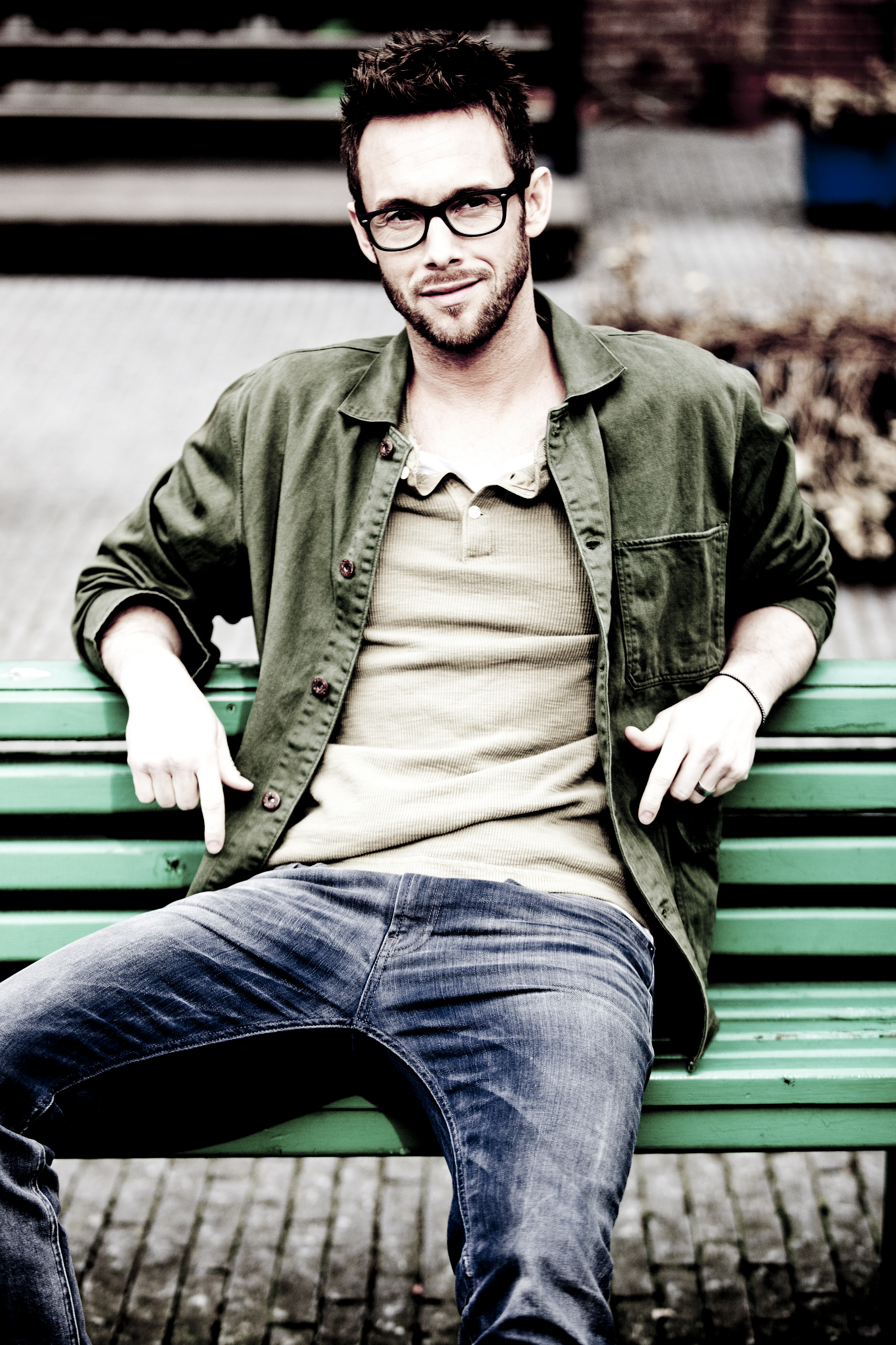 Persfoto - Laura Oldenbroek